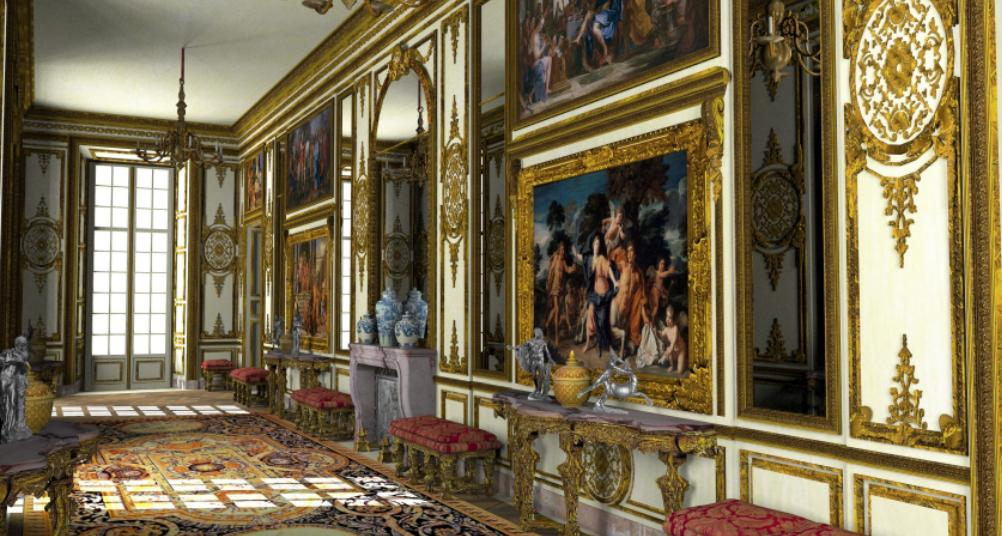 Restitution 3D de la galerie du château-neuf de Meudon, état vers 1709, lors de sa création. Franck Devedjian et Hervé Grégoire, 2014.